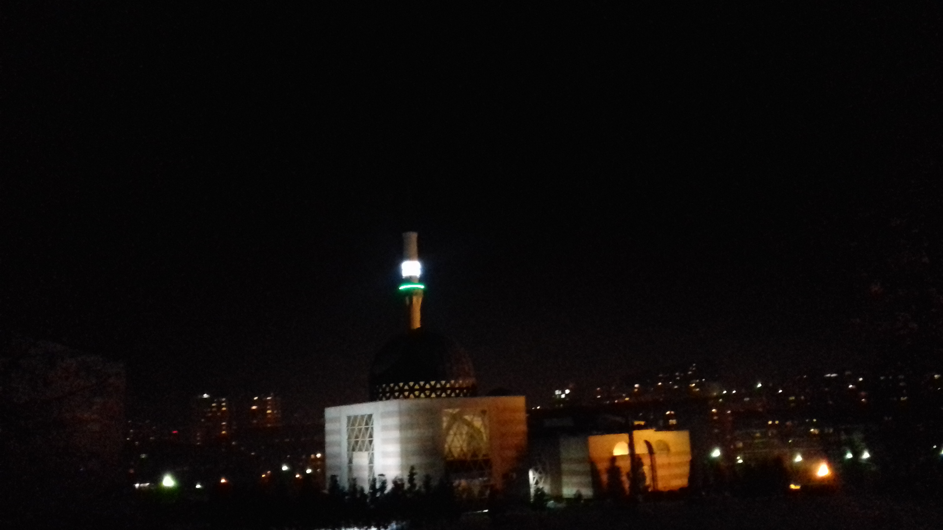 Енсар џамија у Зеници, послије јације